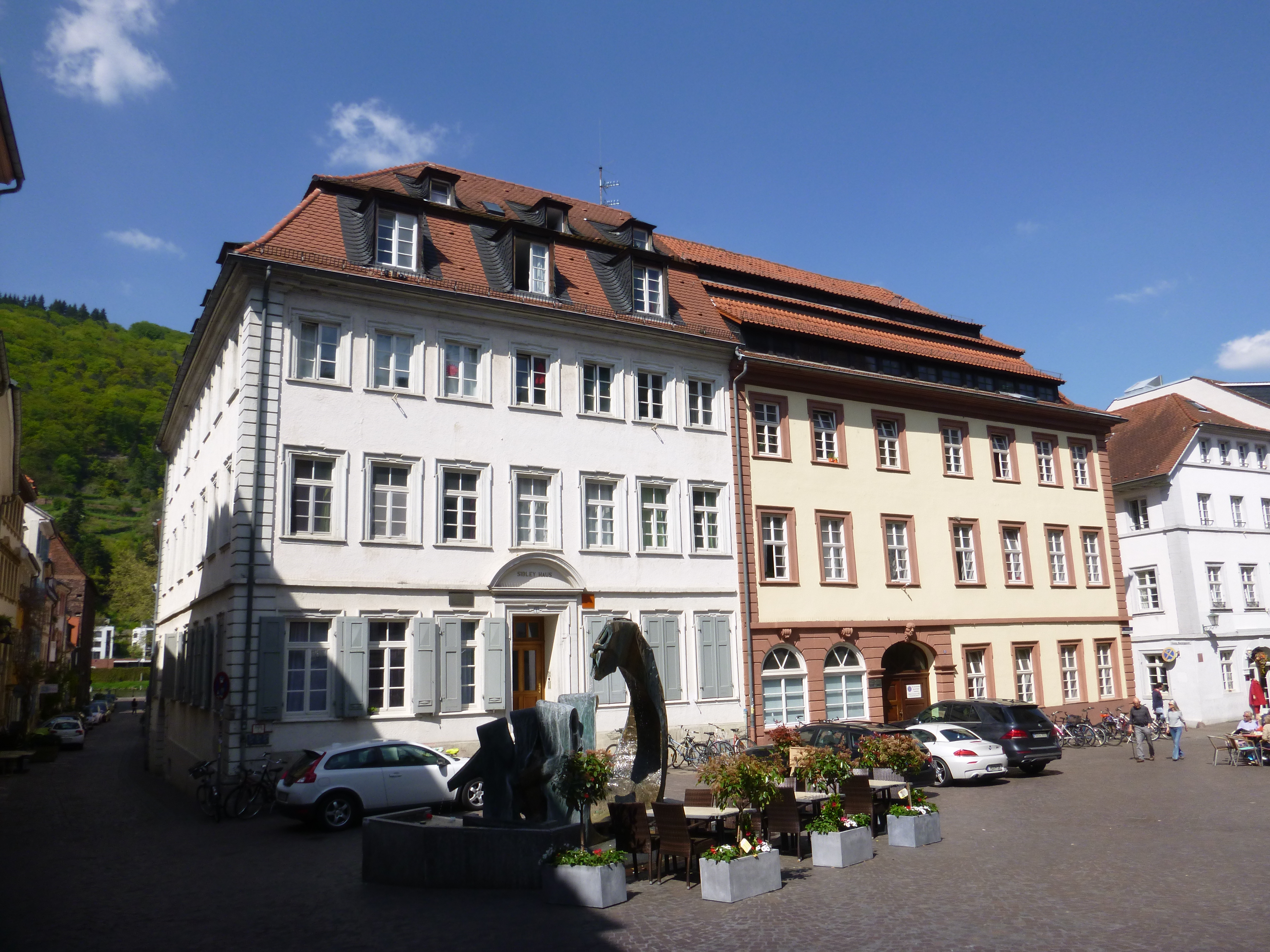 Hajdelbergo, historia domo Sibley-Haus kaj moderna fontano de la placo "Heumarkt"